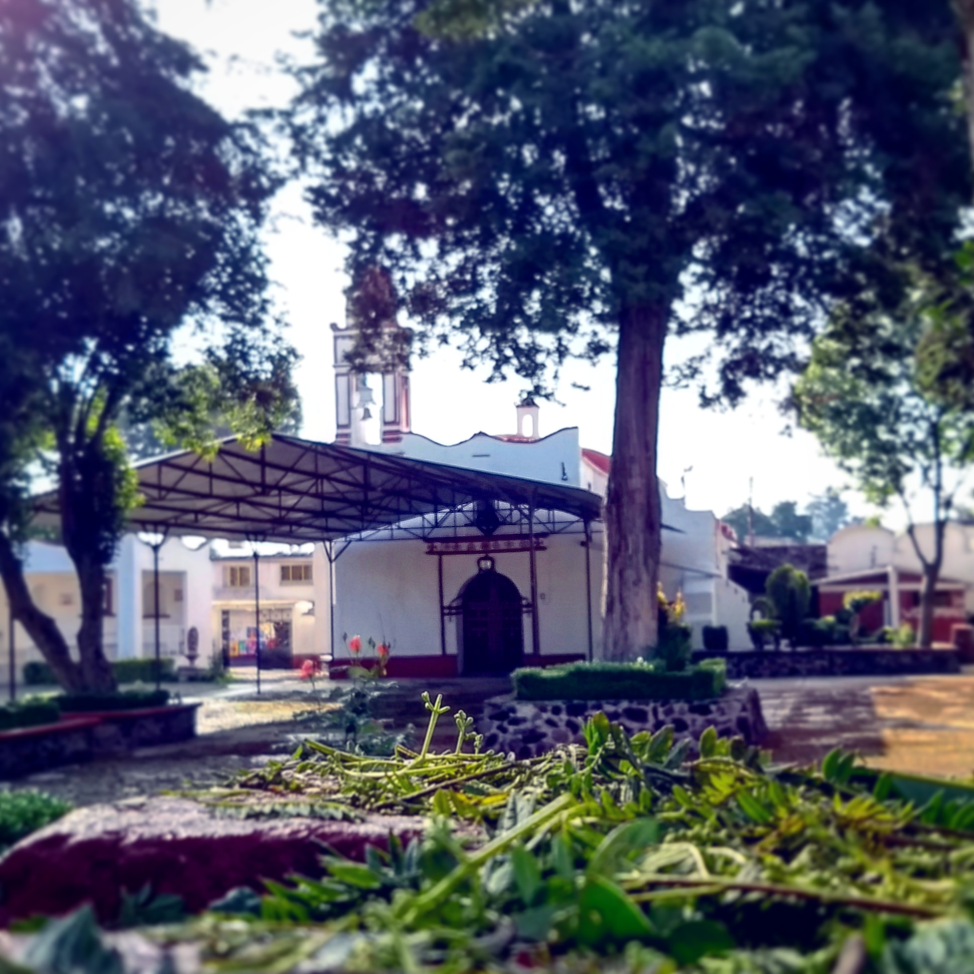 Capilla San Bartolomé Apostol, Xicomulco Milpa Alta